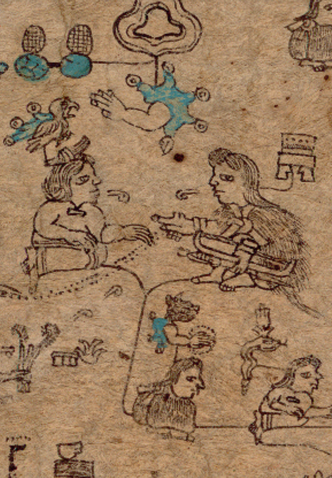 Fragmento de la lámina 3 del Códice Xolotl que muestra el matrimonio de Huetzin de Coatlinchán con Atotoztli de Colhuacan; hacia abajo se ve parte de su descendencia.